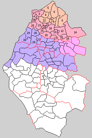 福井県坂井郡の町村制時点の町村。